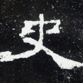 中國東漢漢靈帝建寧二年（公元169年）《史晨前後碑》的隸書“史”字。